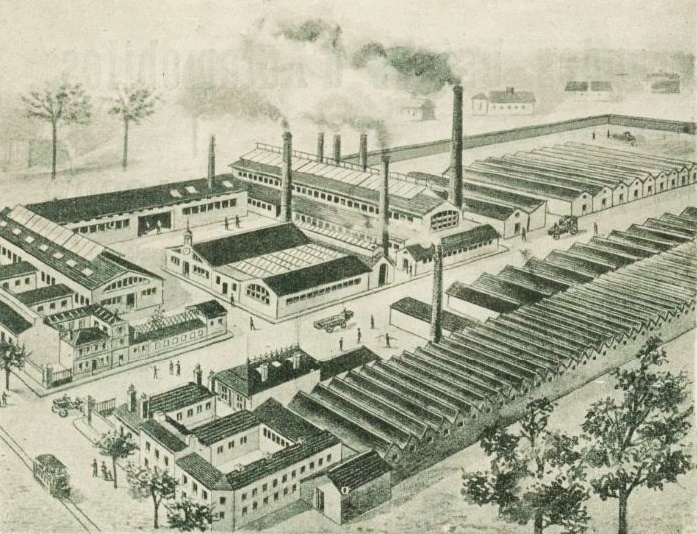 Les usines Panhard d'Ivry en 1900 (La Vie au Grand Air, 27 mai 1900)